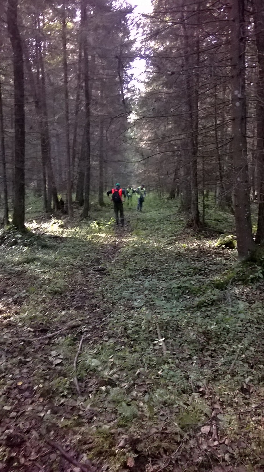 Аперацыя па пошуку згінулага 10-гадовага Максіма Мархалюка, Белавежская пушча (Свіслацкі раён) 26 верасня 2017 года.